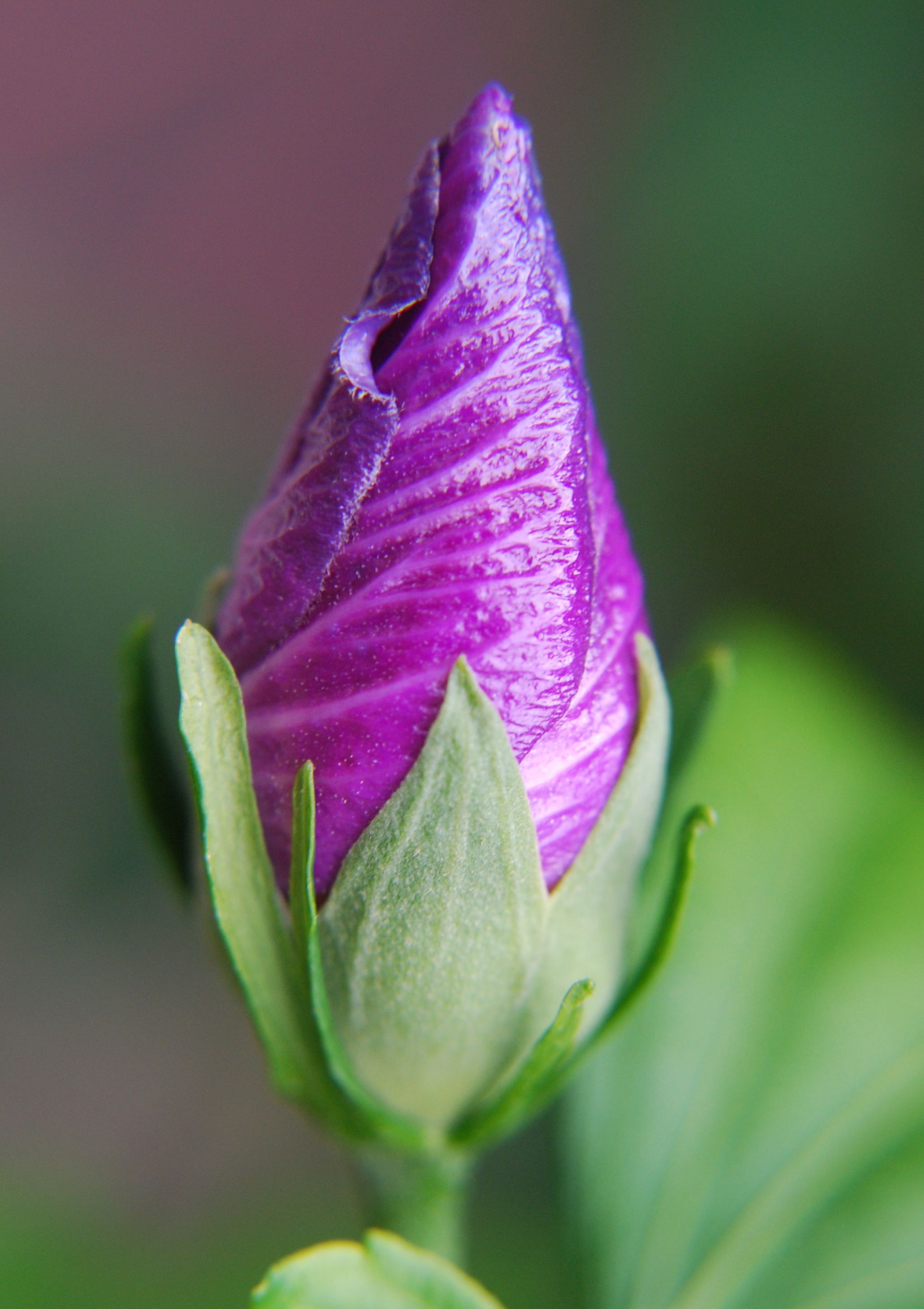 Blütennospe des Strauch-Hibiskus (kurz vor der Blüte)